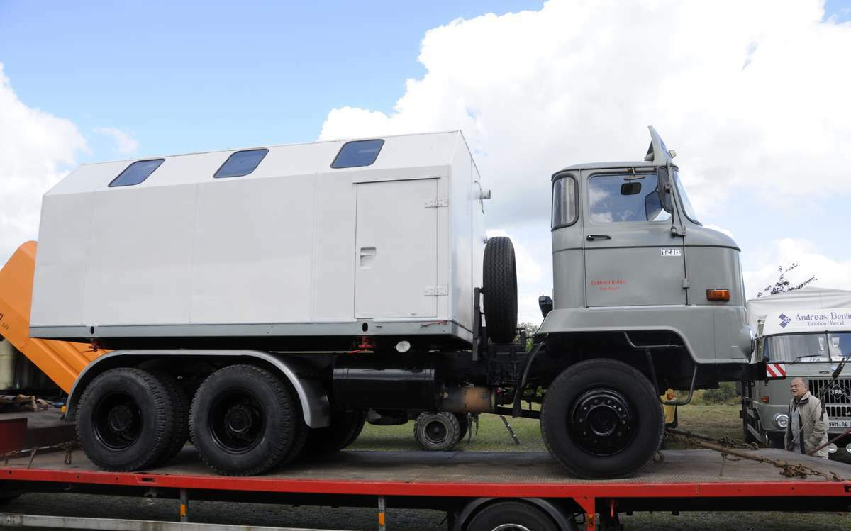 IFA L60 1218 6x4